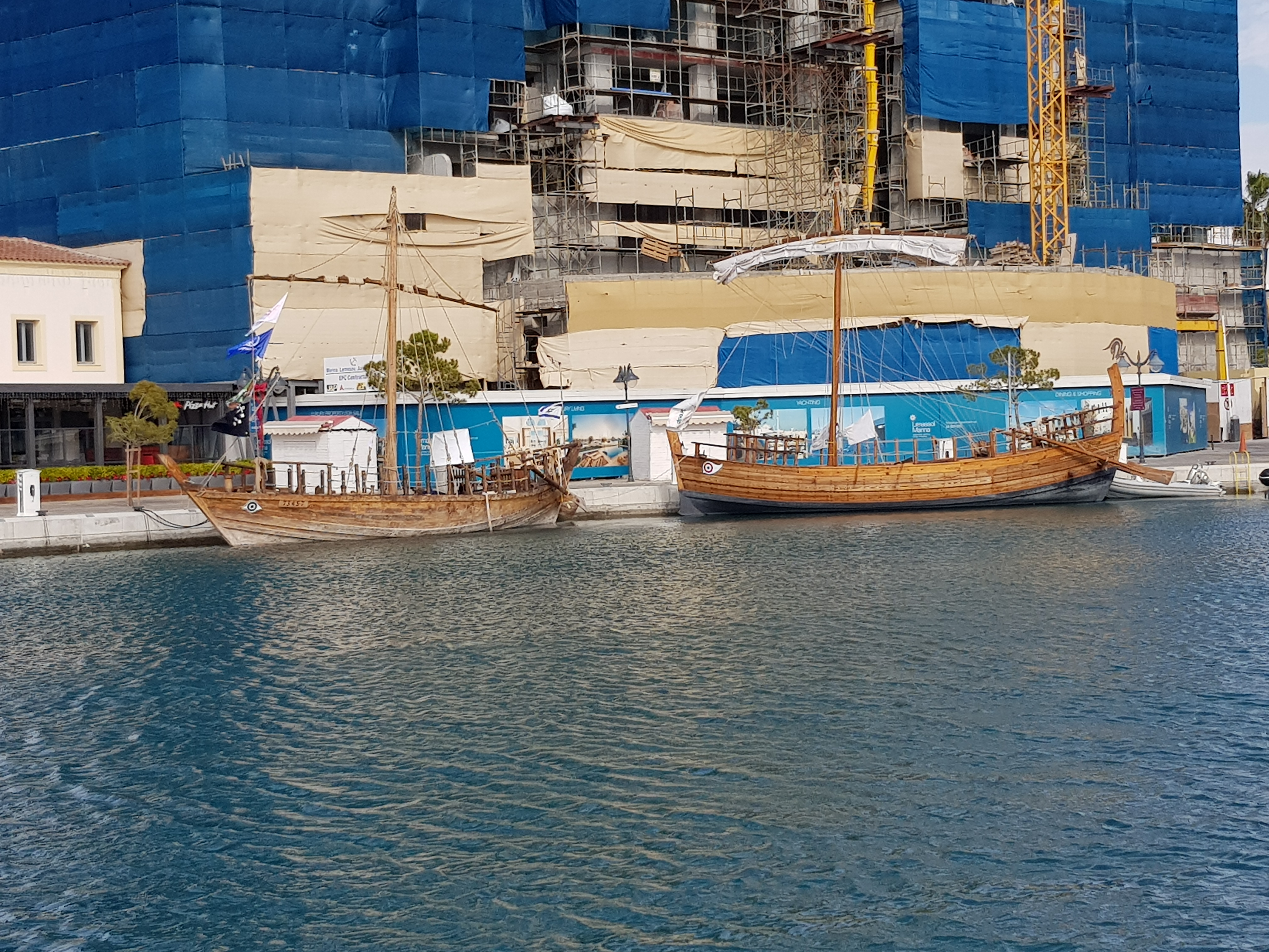 הספינה בקפריסין (משמאל) בסמוך לרפליקה דומה